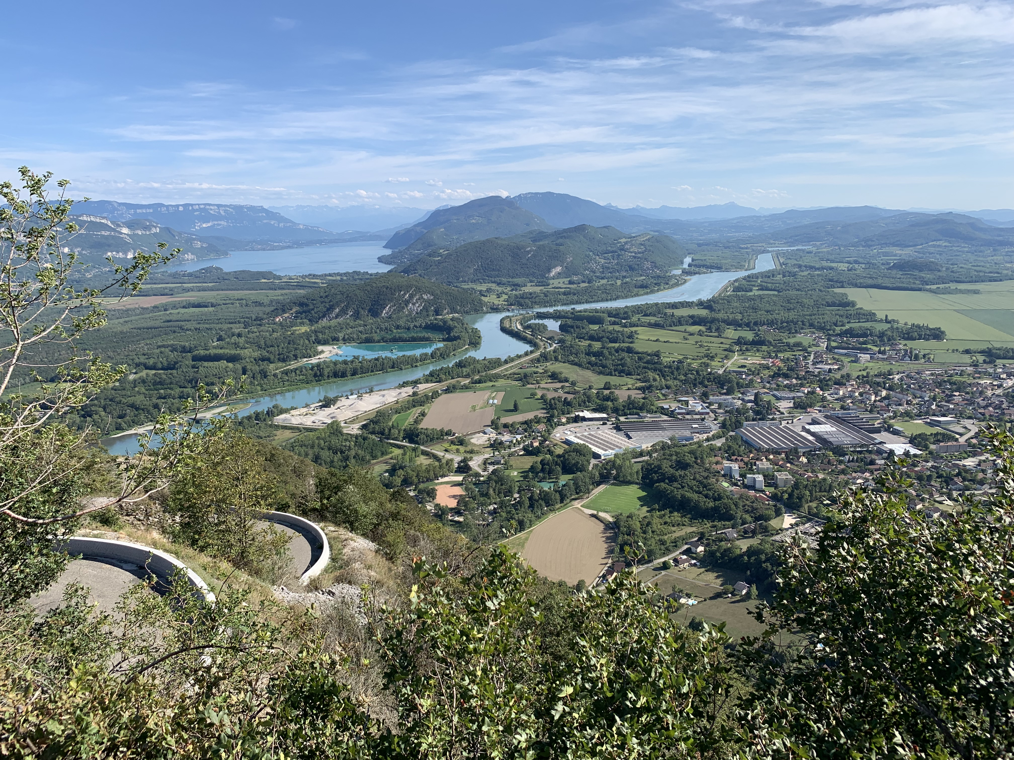 Vue de Culoz depuis les lacets du Grand Colombier.